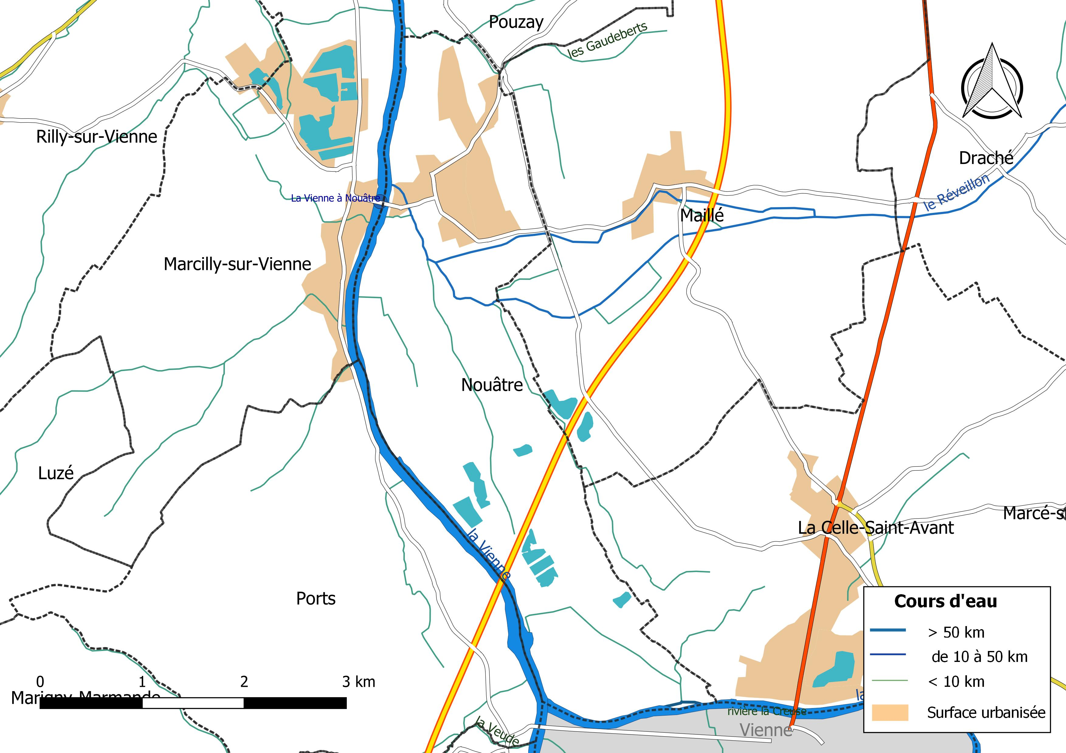 Carte du réseau hydrographique de la commune de Nouâtre (France).